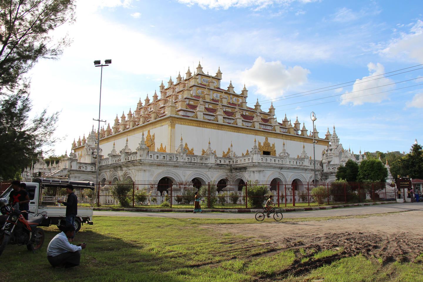 မြန်မာဘာသာ: မဟာအတုလဝေယန်ကျောင်းတော်ကြီး (မန္တလေးမြို့)